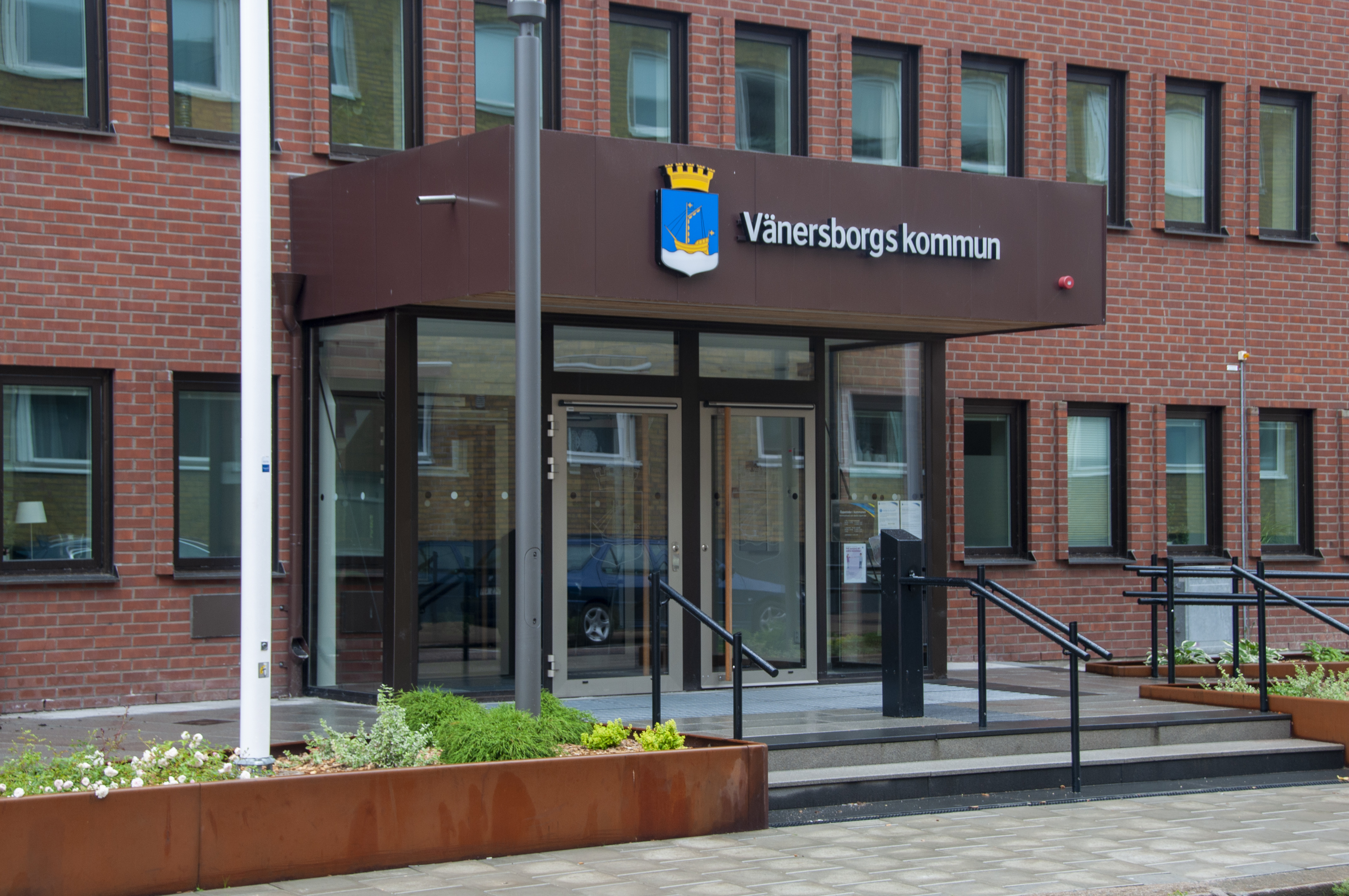 Vänersborgs kommunhus. Byggnadsår 1972-74